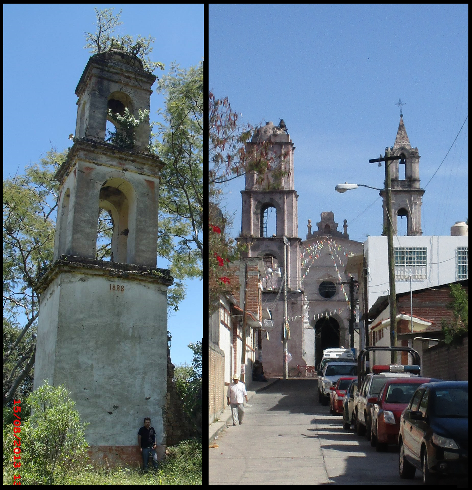 Monumentos históricos del municipio de Pilcaya en el estada de Guerrero, México